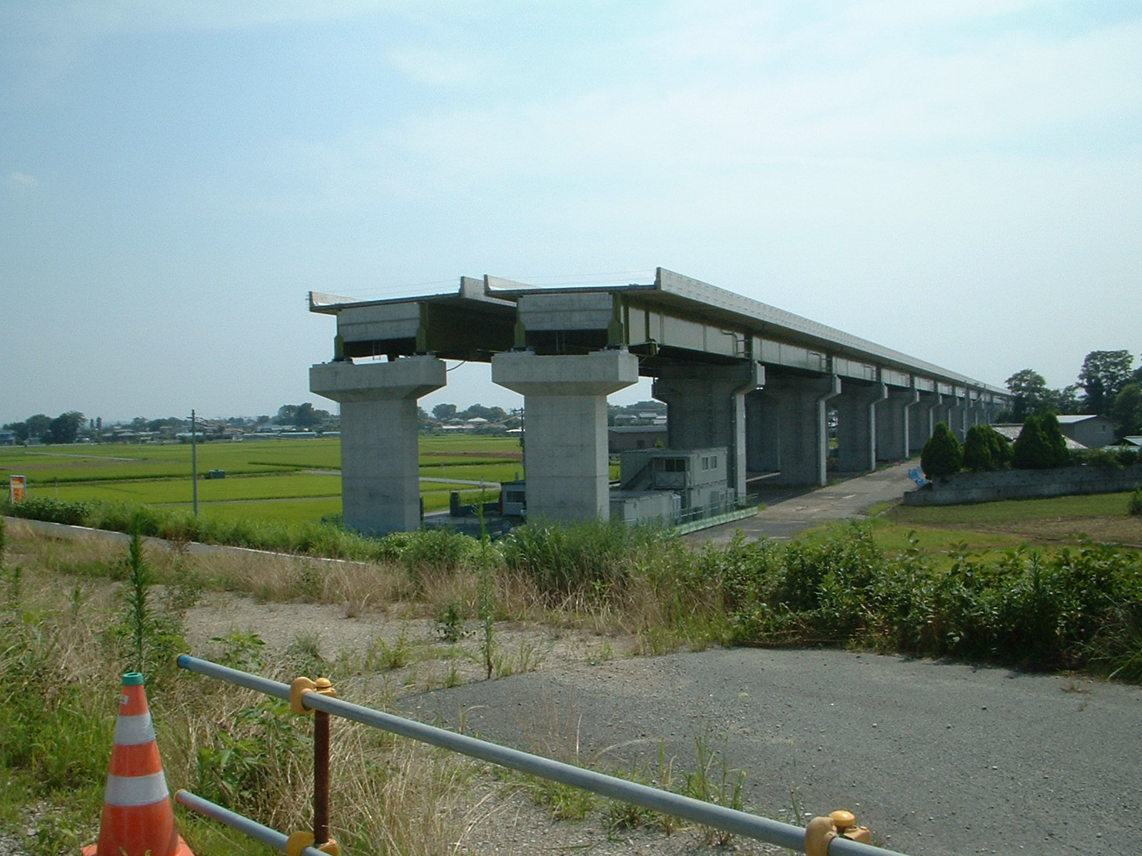 2008年の7月末で圏央道は川島町の荒川直前まで完成している